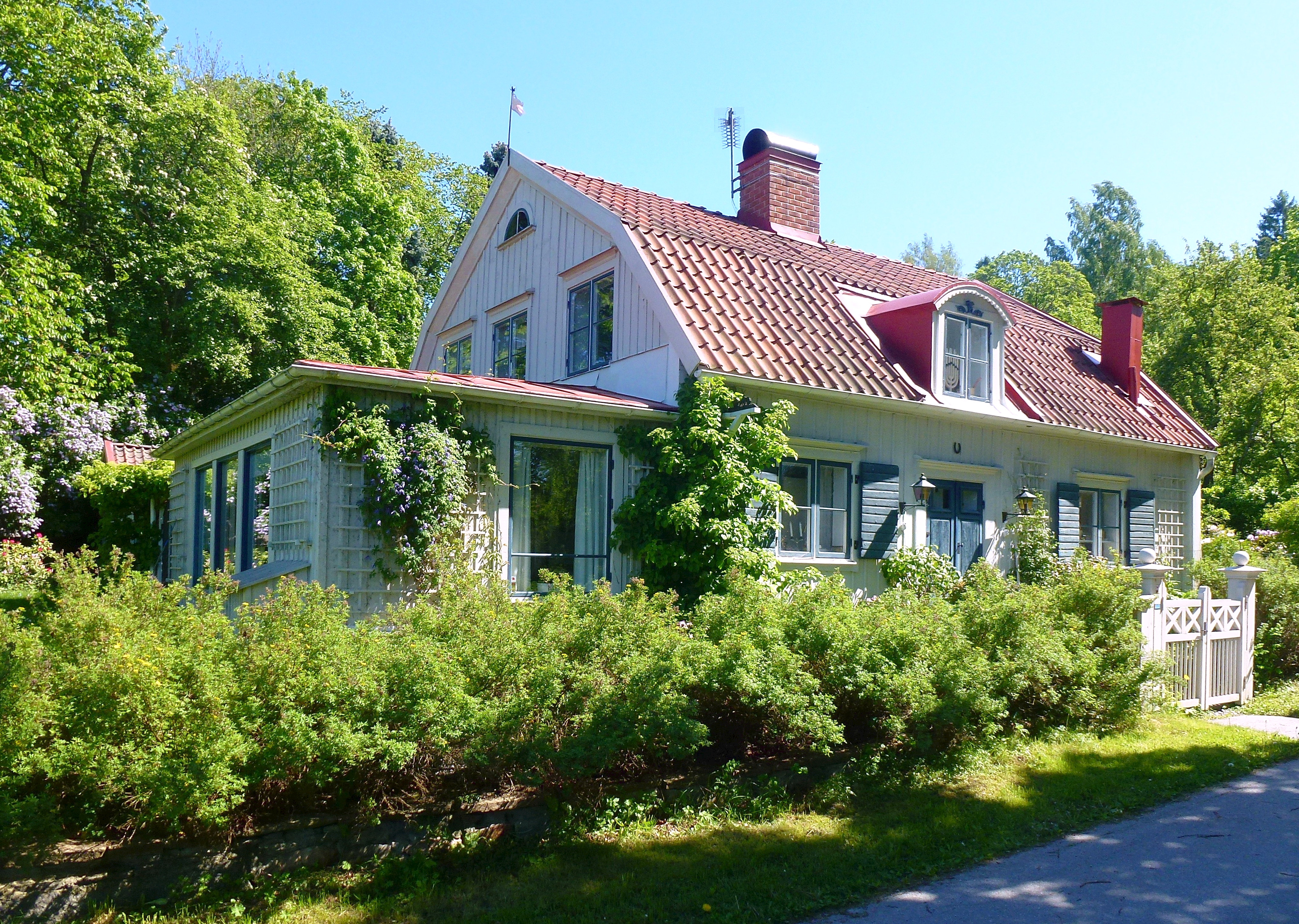 Villa Snörin på Ulriksdals slottsområde